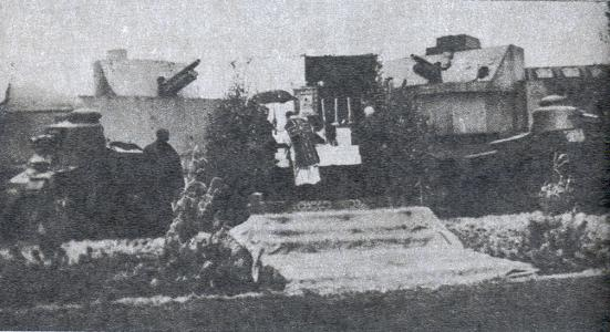 Pociąg pancerny Grozny podczas uroczystości świat dywizjonowych 2 VI 1936 r.